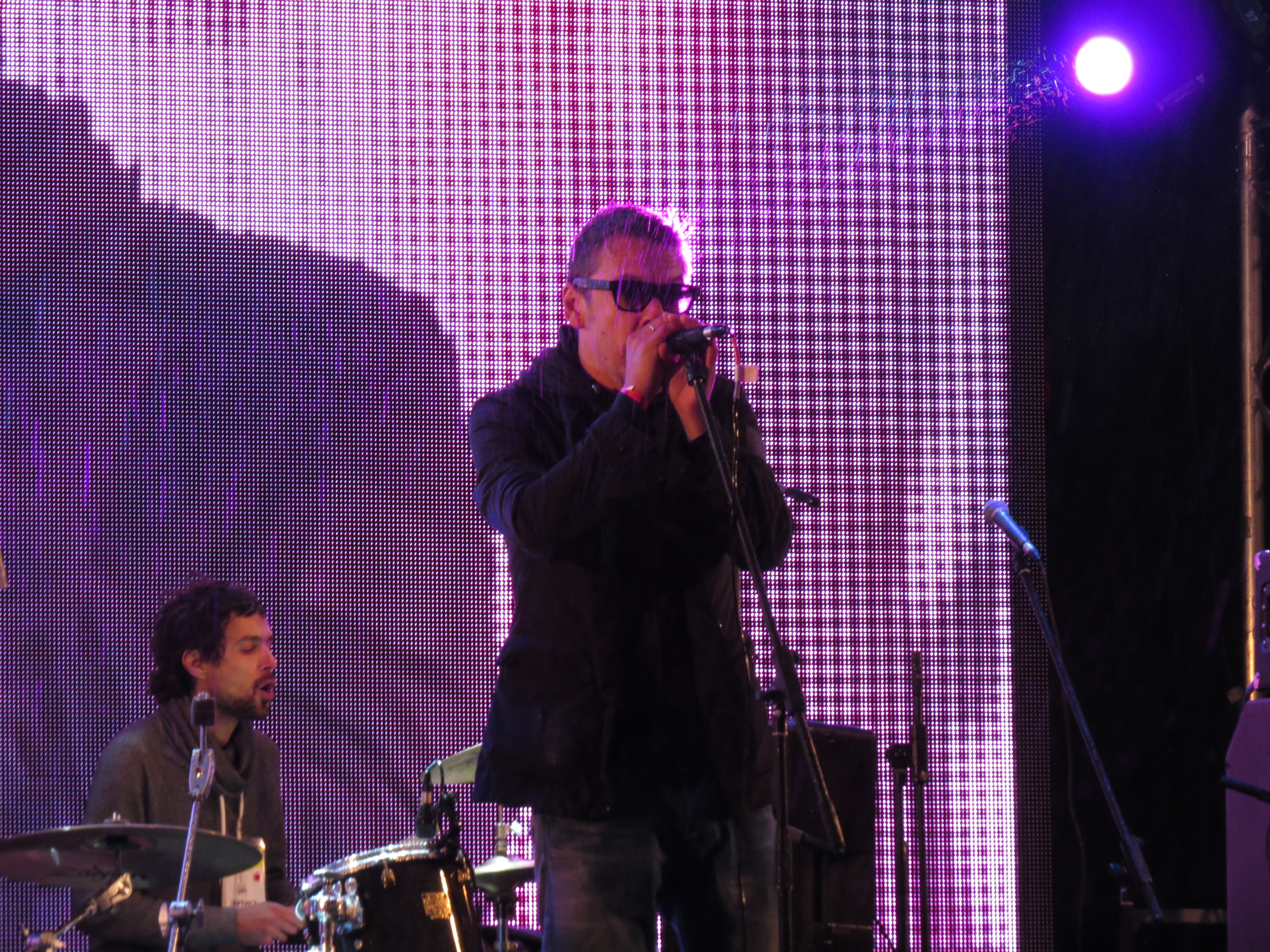 Группа Танцы минус на концерте-митинге в поддержку кандидата в мэры Москвы Алексея Навального на проспекте Сахарова 6 сентября 2013 года